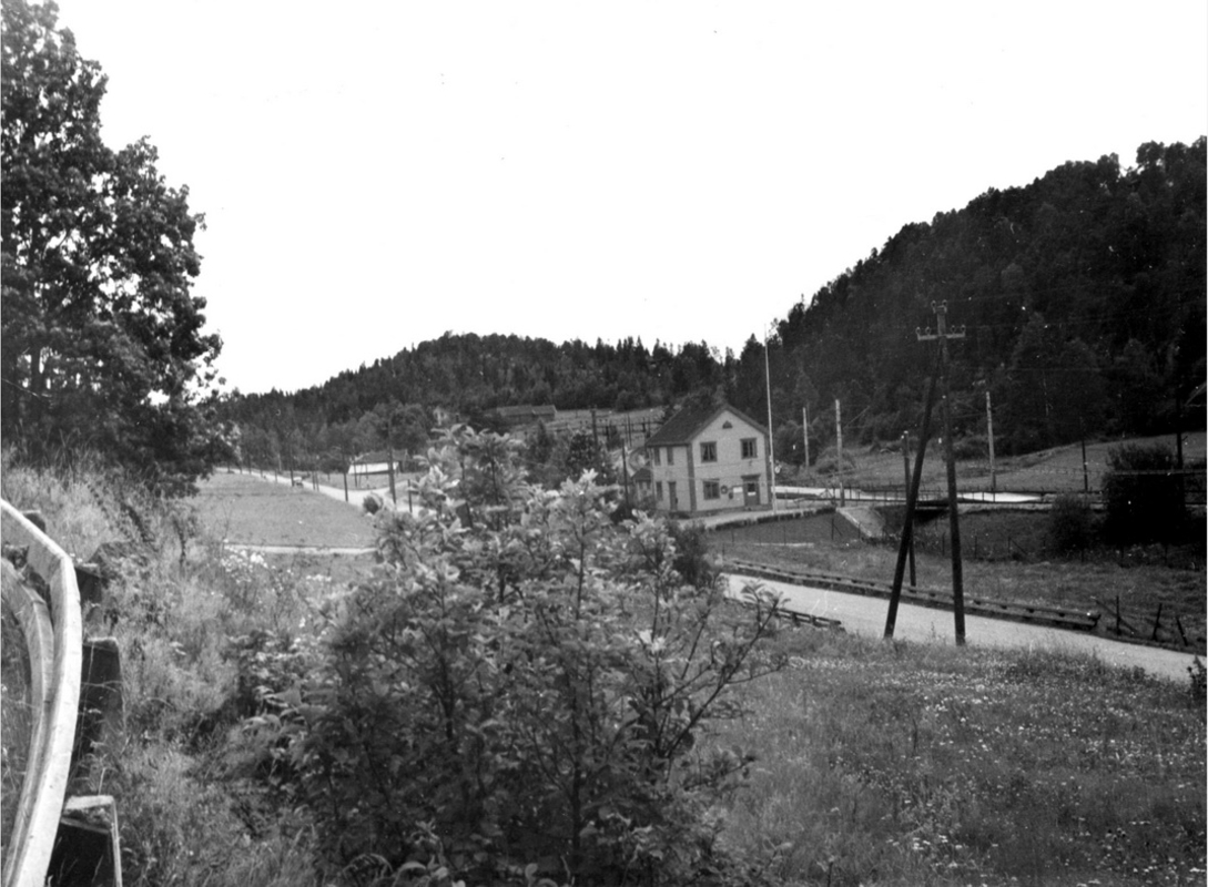 Hauketo stasjon sett mot sør fra Øvre Prinsdals vei, ca. 1950